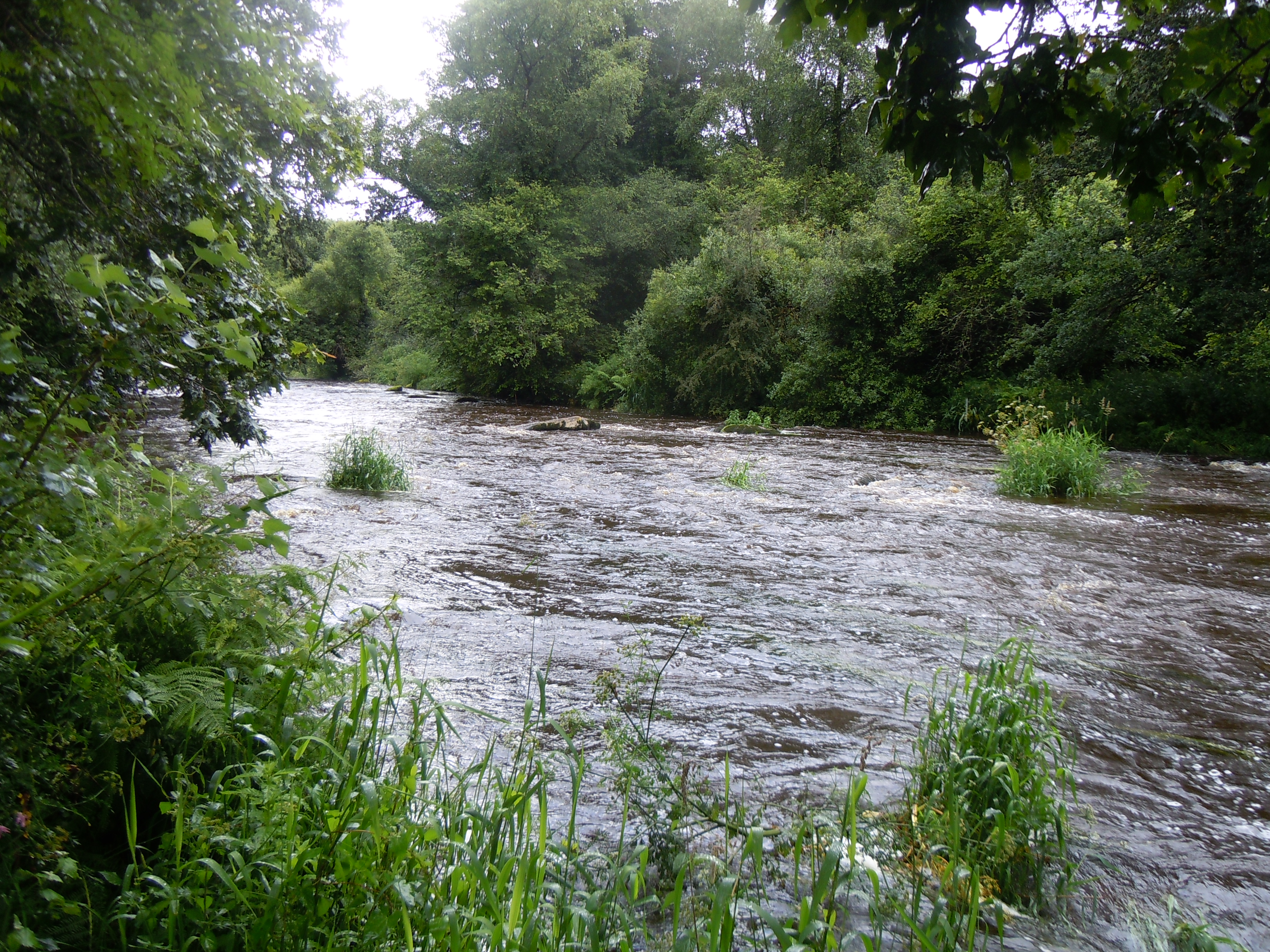 La rivière Le Scorff dans la forêt de Pontcallec (Morbihan)